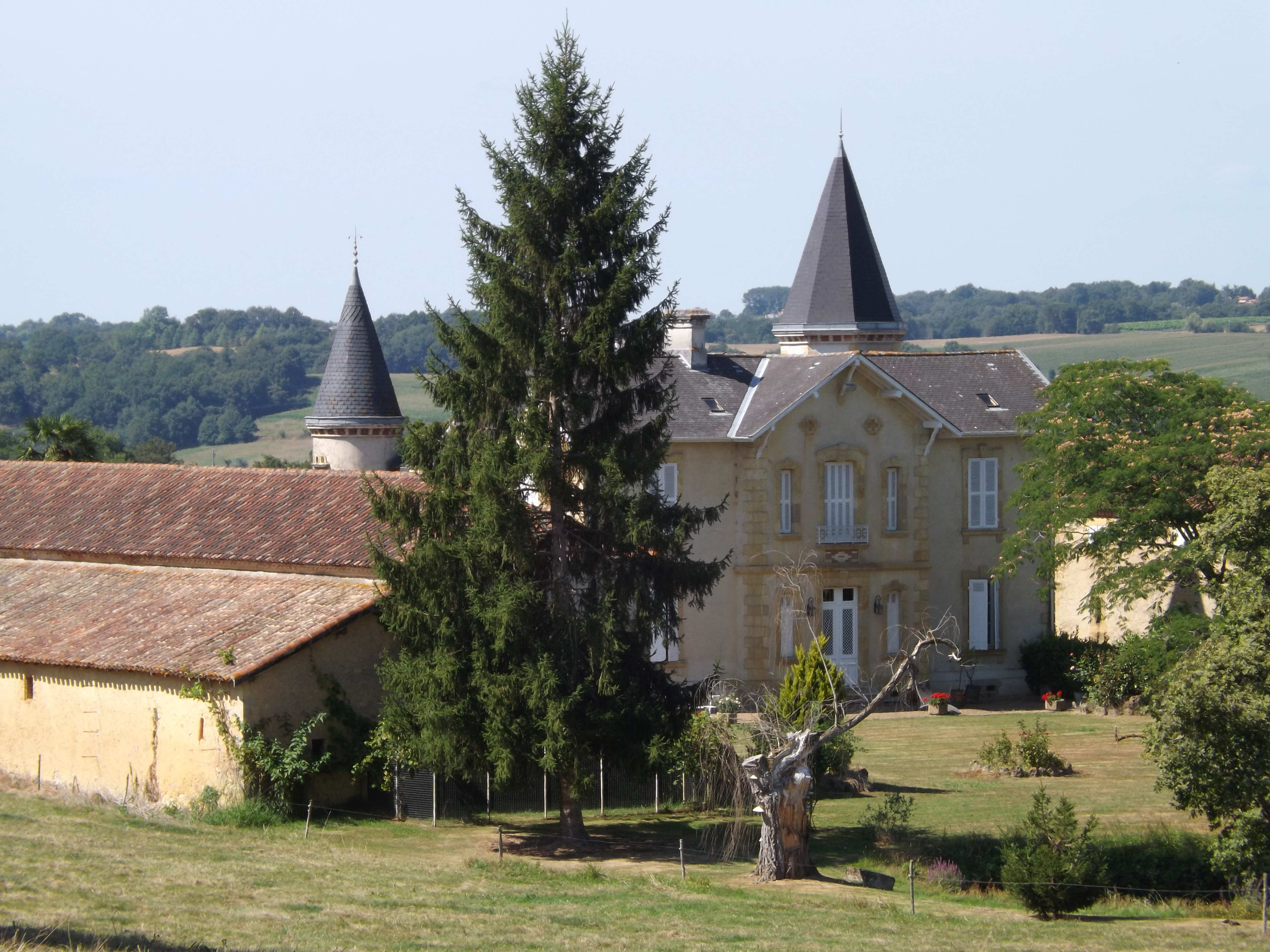 Manoir de Drouilhet, Clèdes, Landes, France